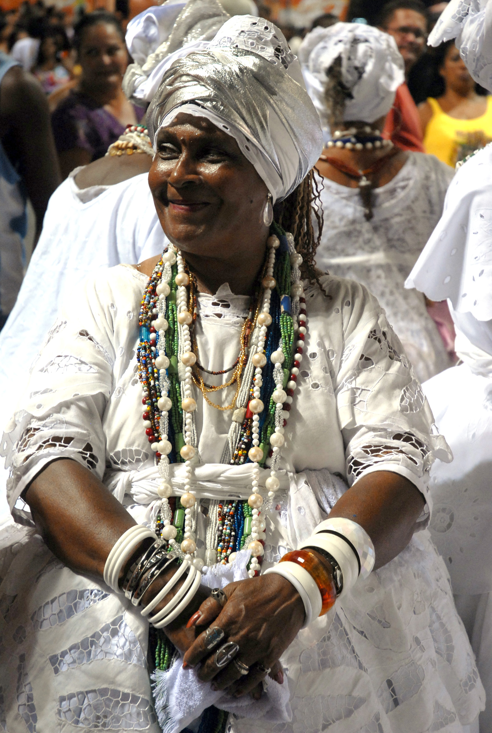 Baiana Festa de Iemanja e carnaval de Salvador, Brazil